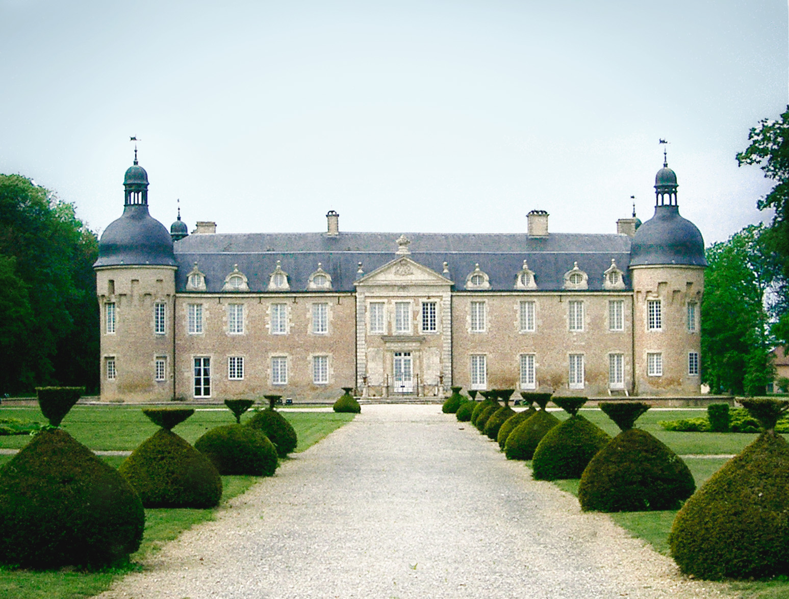 Château de Pierre de Bresse en Saône et Loire (71), France - construction du XVIIe siècle devenue Ecomusée de la Bresse.